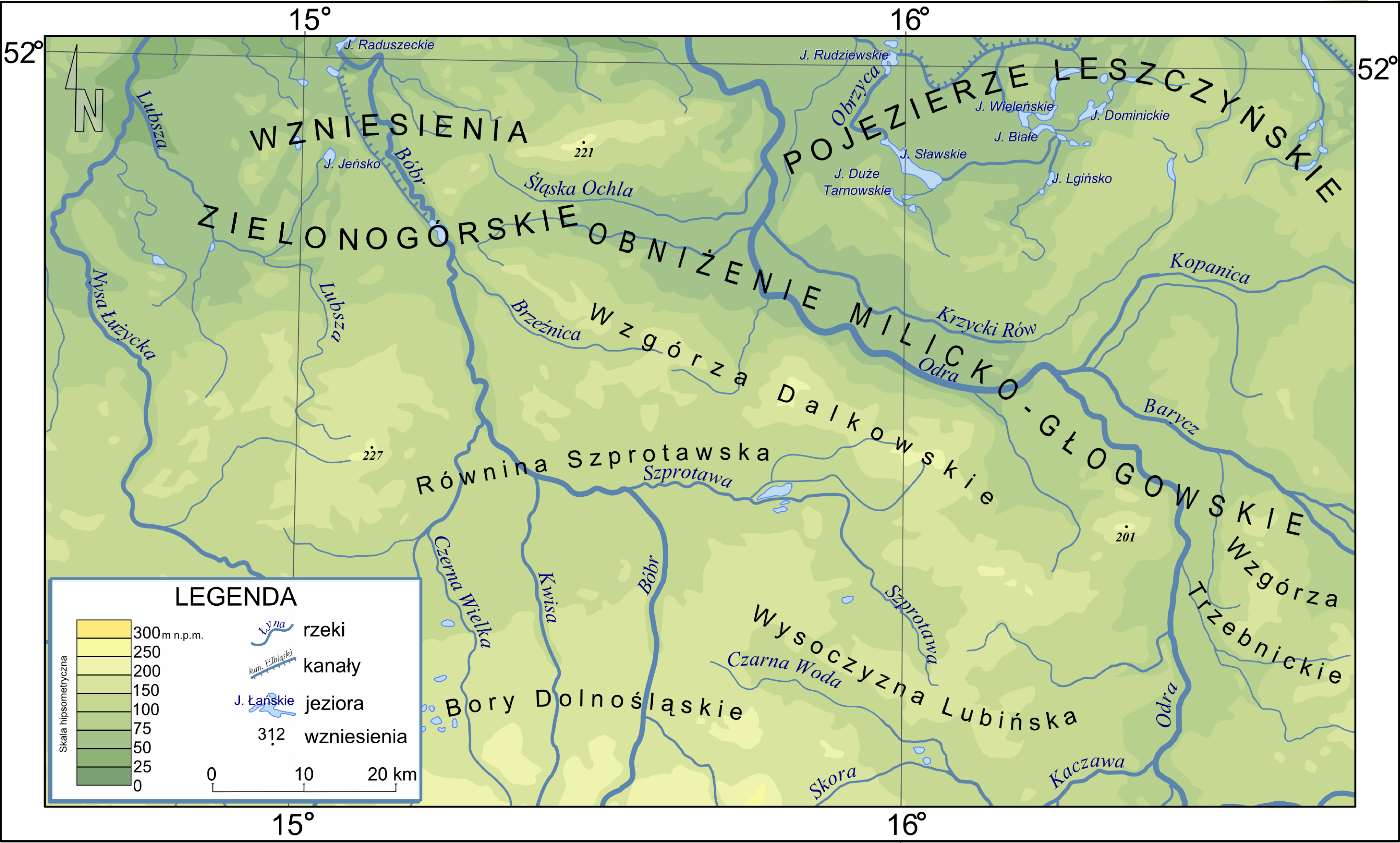 Mapa części Niziny Śląsko Łużyckiej i Wału Trzebnickiego